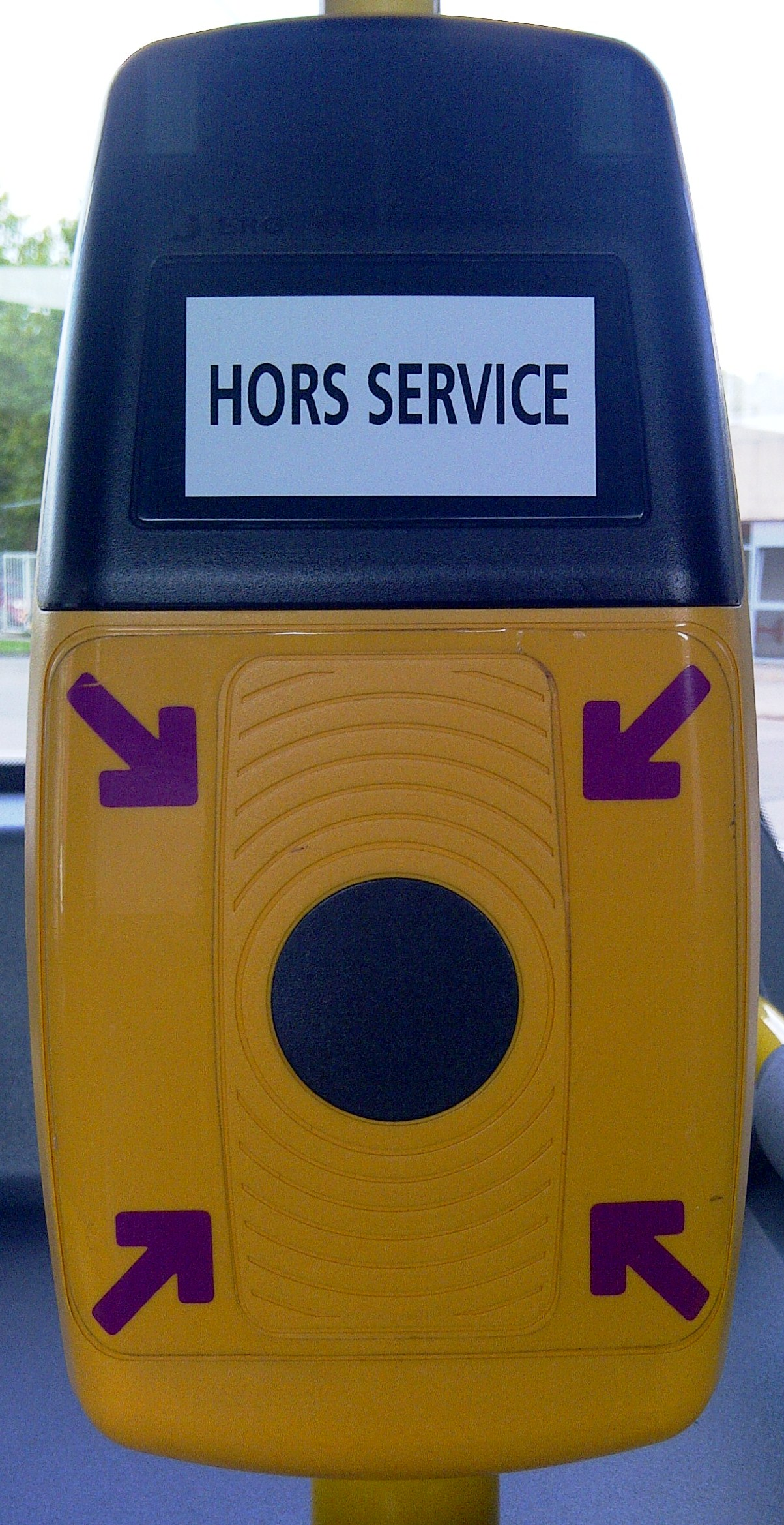 e-go Validationsapparat deen zenter dem 1. September 2014 ausser Betrib ass.